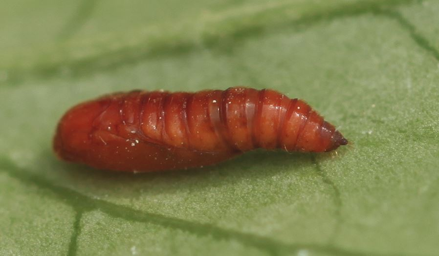 Puppe von Anacampsis timidella am 22. Mai 2020